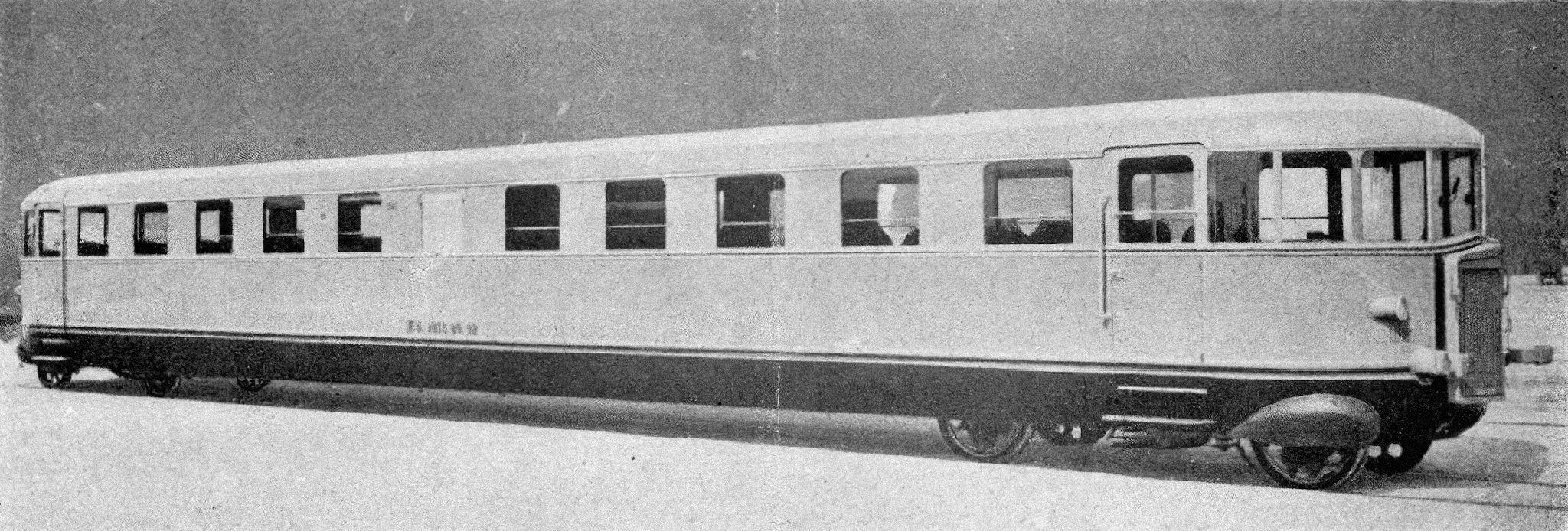 Motorový vůz Littorina ALb 80